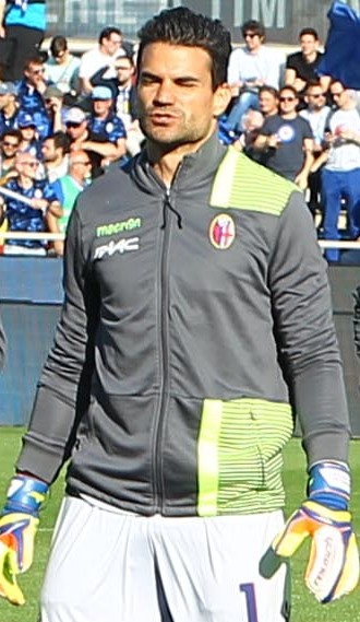 Bergamo, stadio Atleti Azzurri d'Italia, 22 aprile 2017. Il portiere di calcio Angelo da Costa al Bologna, prima della trasferta persa contro l'Atalanta (2-3) e valevole per la 33ª giornata del campionato italiano di Serie A 2016-17.